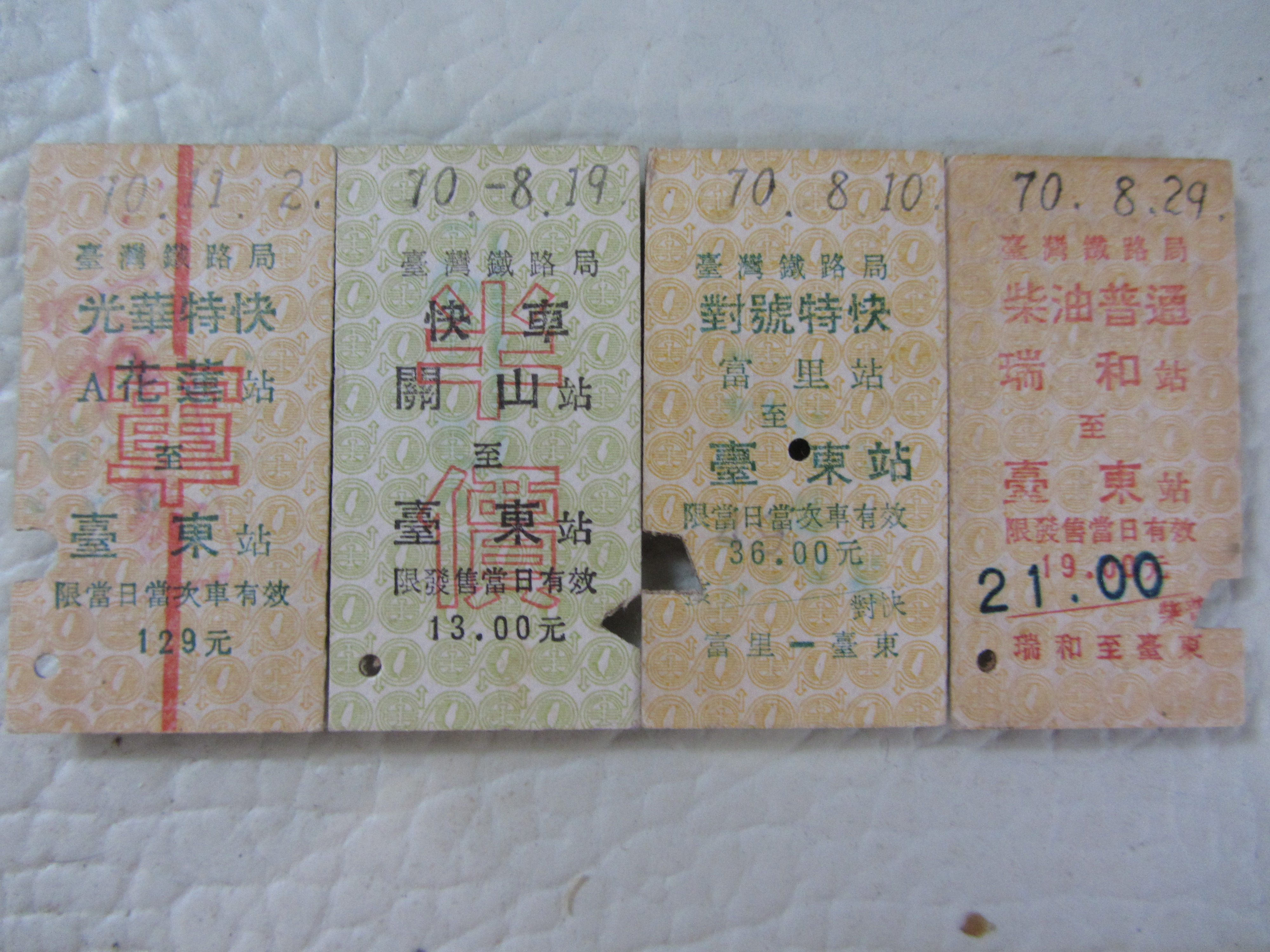 臺灣鐵路管理局臺東線拓寬前名片式車票